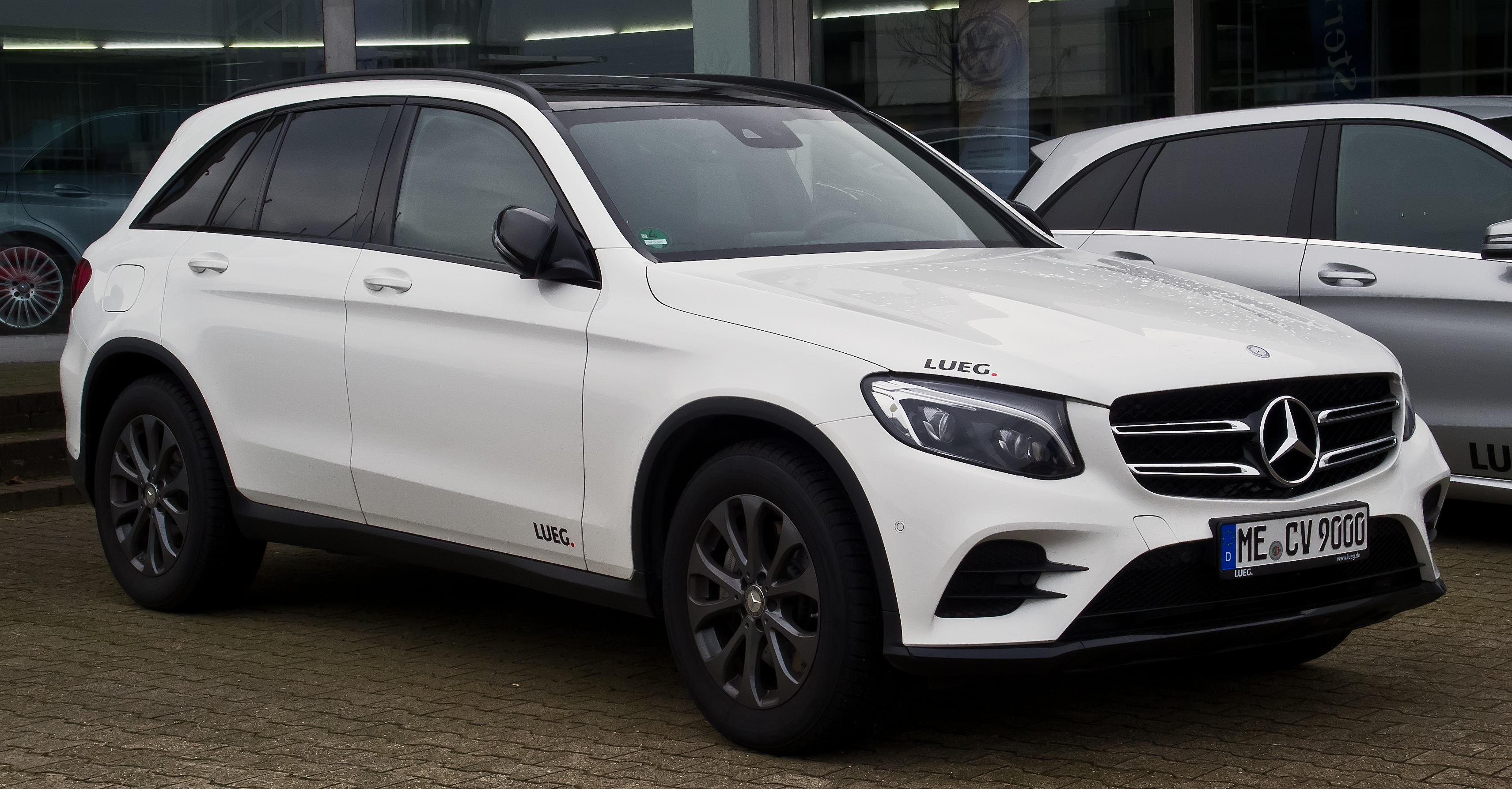 Mercedes-Benz GLC 220 d 4MATIC AMG Line (X 253)